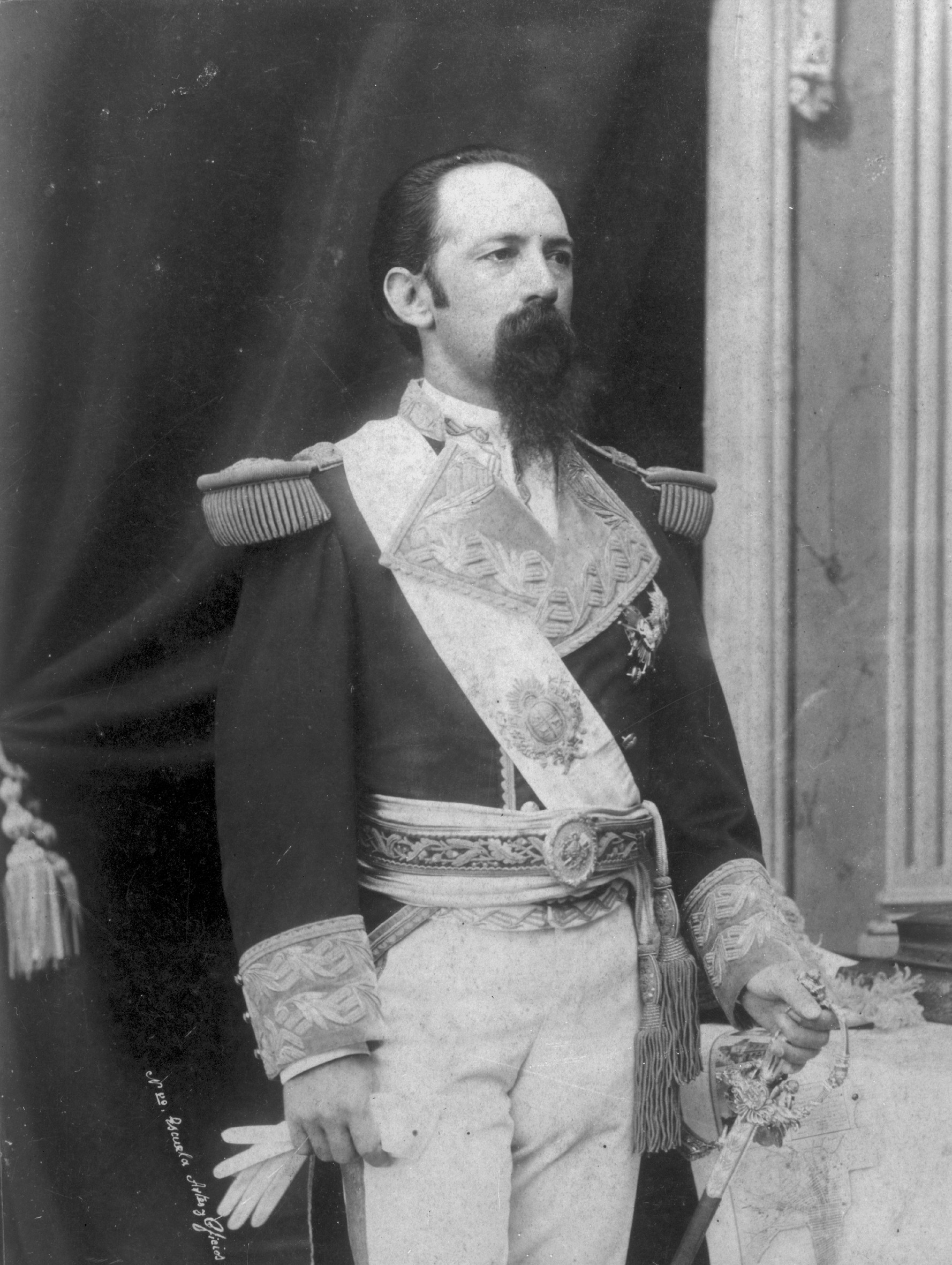 Fotografía del General Máximo Santos (1847 - 1889), militar y político uruguayo.